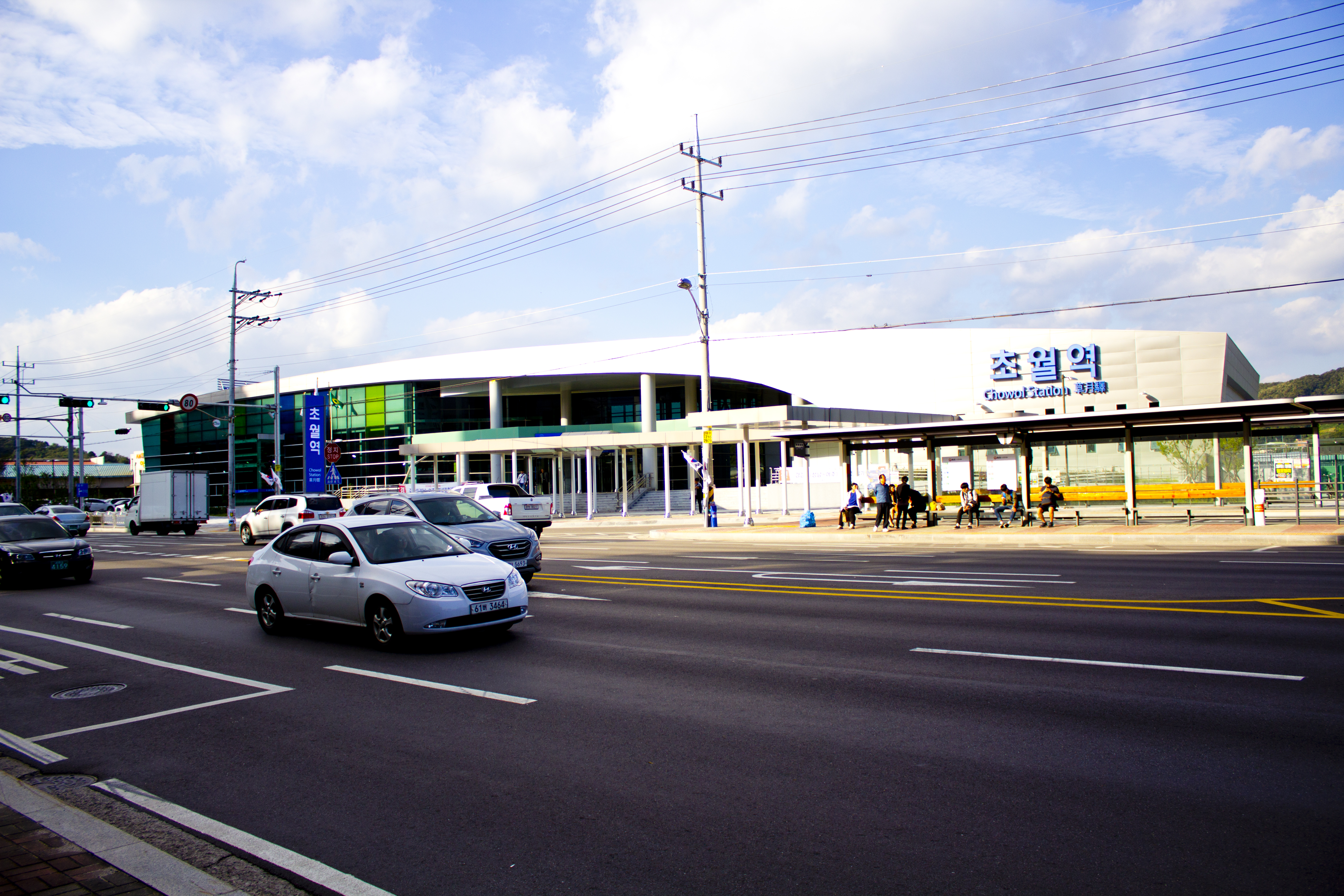 경강선 초월역 역사 전경